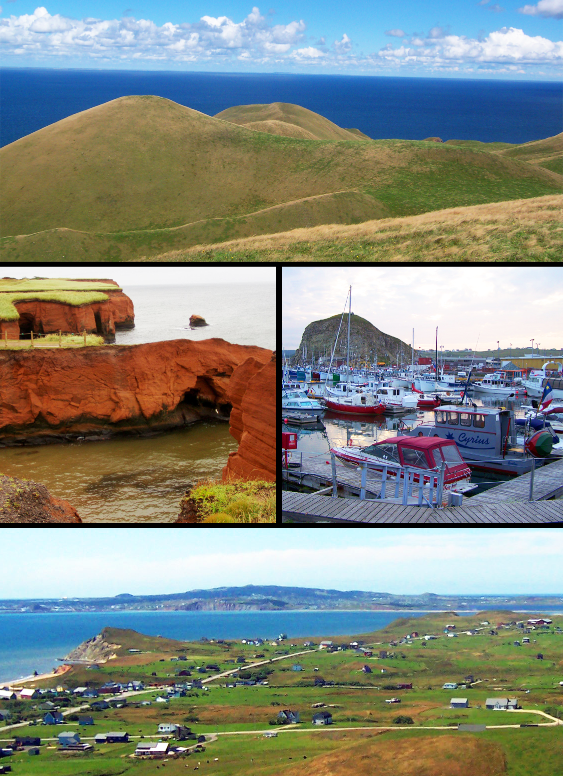 Montage réalisé à partir de